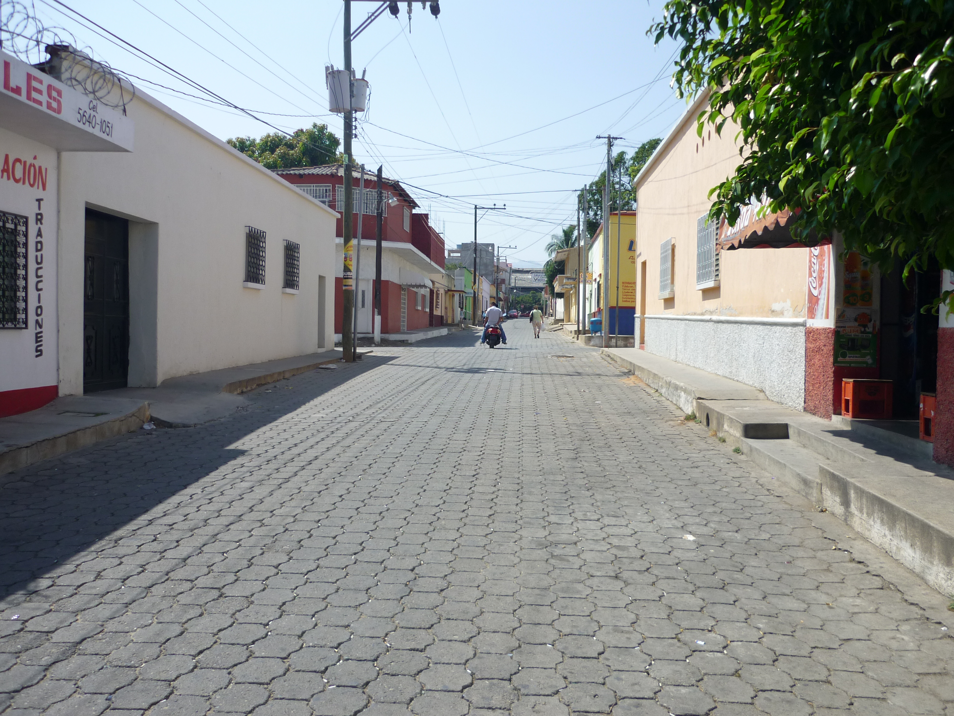 Zona 2: Colonia El Milagro. Sector de la 9a. Avenida "A" de la Colonia El Milagro, una de las colonias más antiguas de la ciudad.